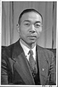 森山諭牧師